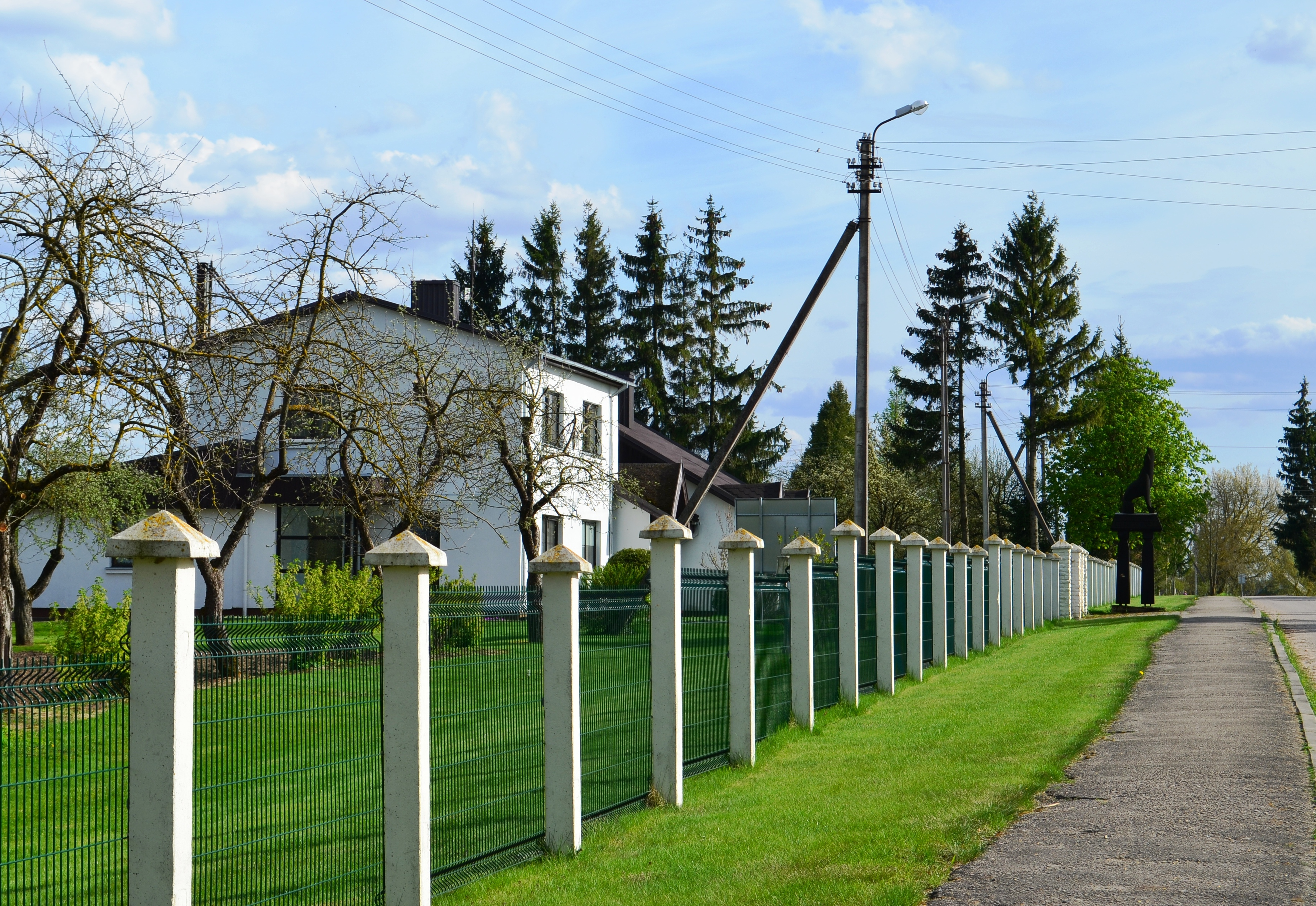 Anciškio girininkija, Pauslajo k., Kėdainių raj.